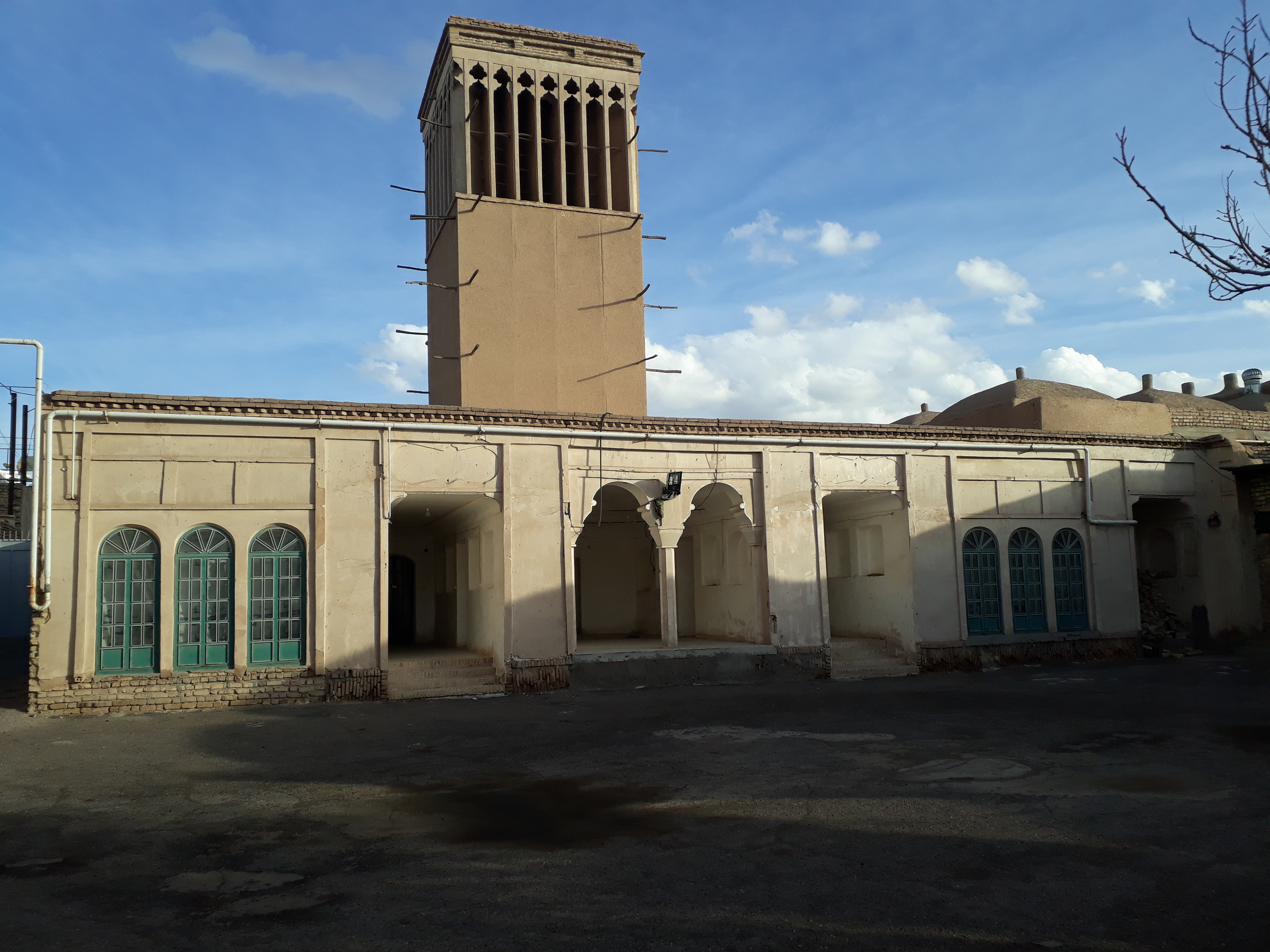 بادگیر خانه حاج رشید